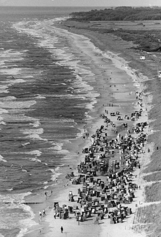 ADN-ZB Sindermann 1.9.87-zei-Bez. Rostock: Urlaubszentrum. Auch wenn in diesem Sommer die Strände nicht so voll wie gewohnt waren, gehört doch der Bezirk Rostock mit seinen 1.470 km Küste zu den beliebtesten Urlaubszentren der DDR. 1.130 km sind Boddenküste und 340 km Außenküste, wovon rund 280 km für das Erholungswesen, wie hier bei Graal-Müritz, genutzt werden können. Rund 3,5 Millionen Menschen verbringen alljährlich im Küstenbezirk ihren Urlaub. - Luftbild freigegeben für die Veröffentlichung unter der Registierungsnummer ZLB-B 270050-014 - (Bei Veröffentlichung bitte mit angeben)